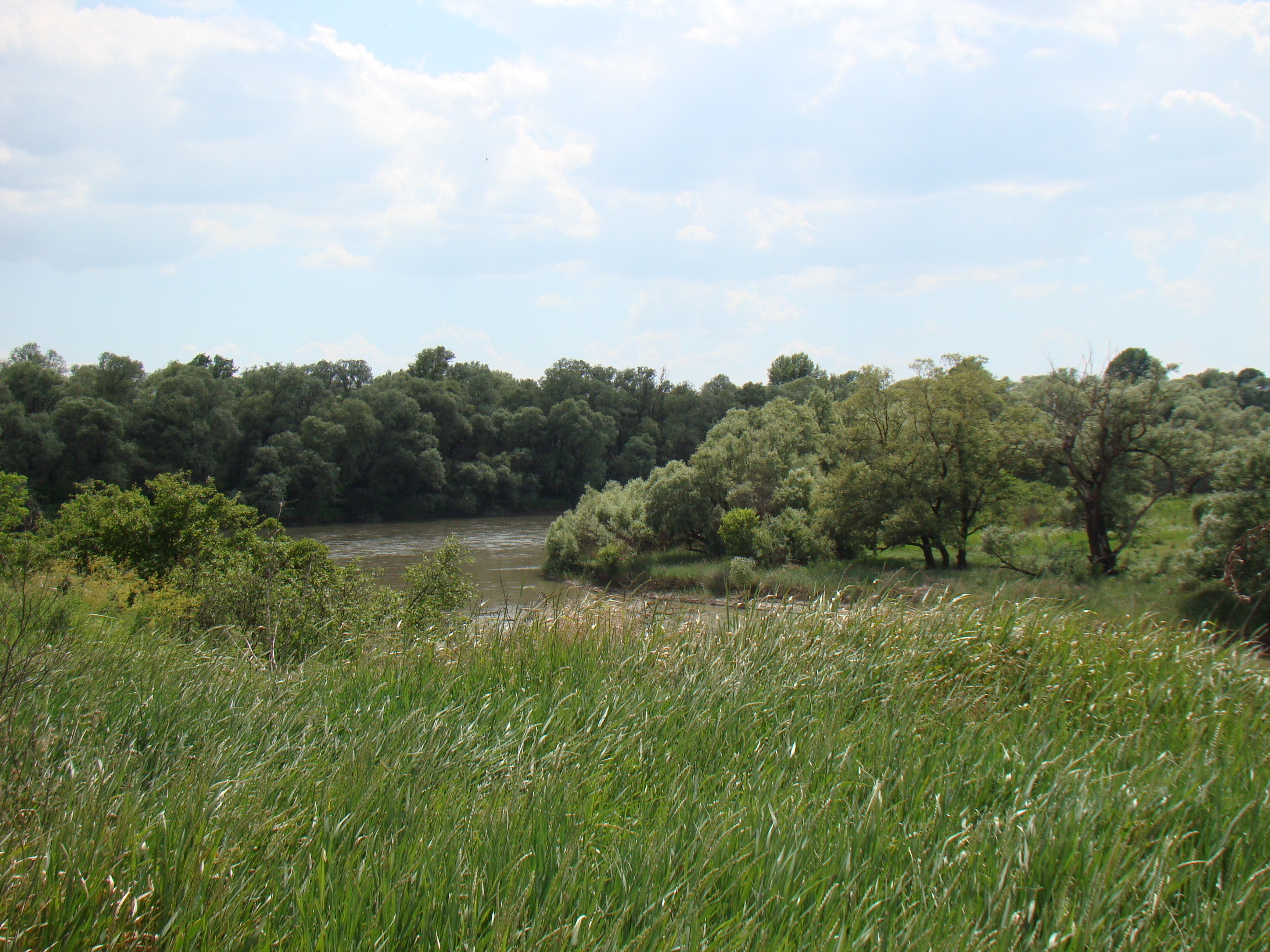 Река Лаба. Окрестности хутора Огонёк, Усть-Лабинский район.